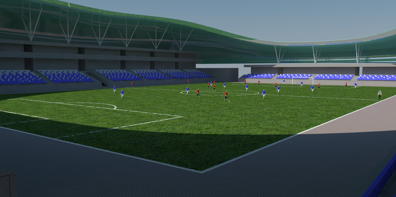 Bodek Architects Tiberias Football Stadium